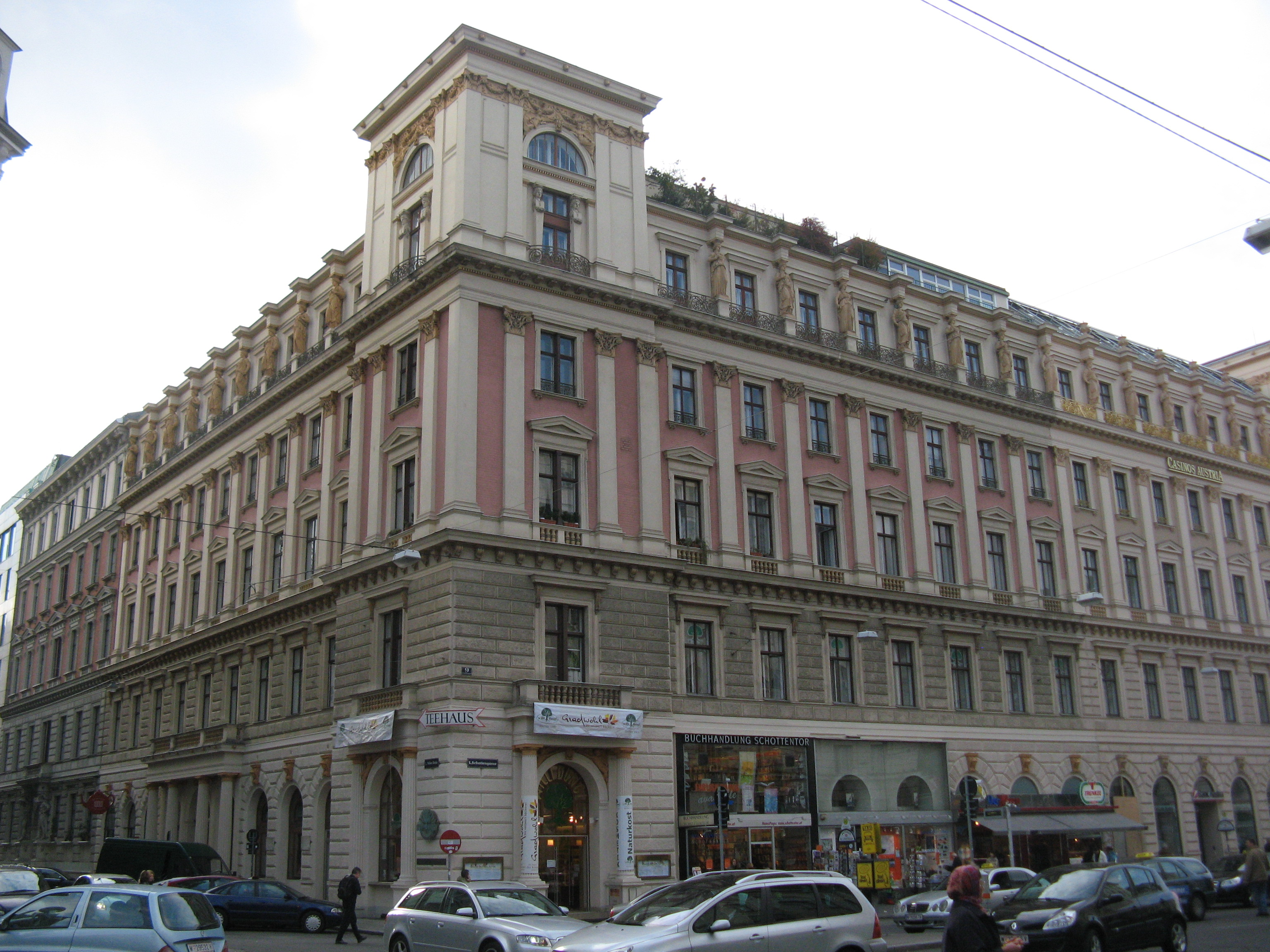 Haus (1869) von Carl Tietz, Schottengasse 9, Wien-Innere Stadt